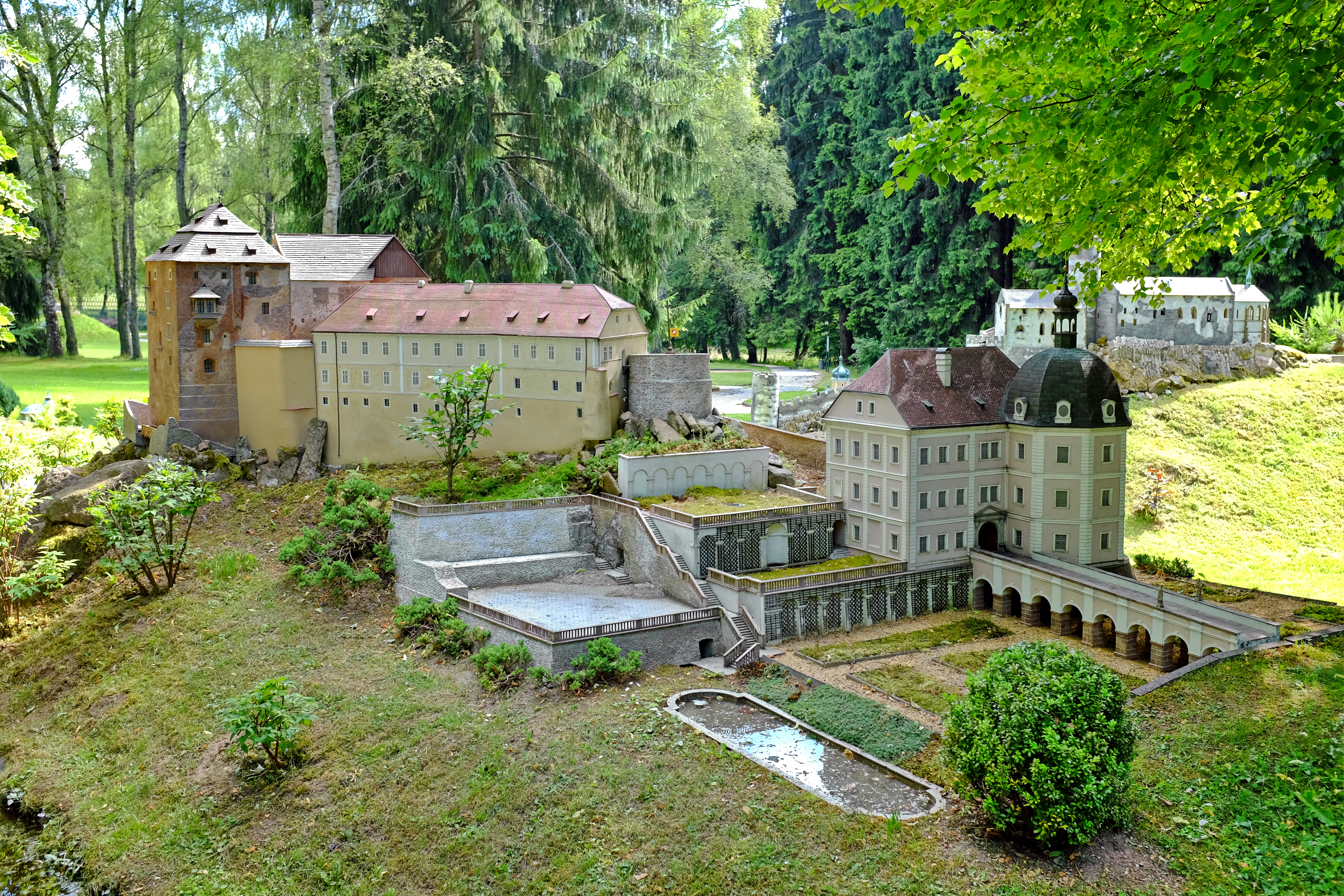 Boheminium Park v Mariánských Lázních, model významé památky - hrad a zámek Bečov nad Teplou